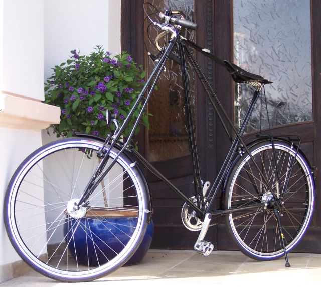 Pedersen Fahrrad, Stahlkocher